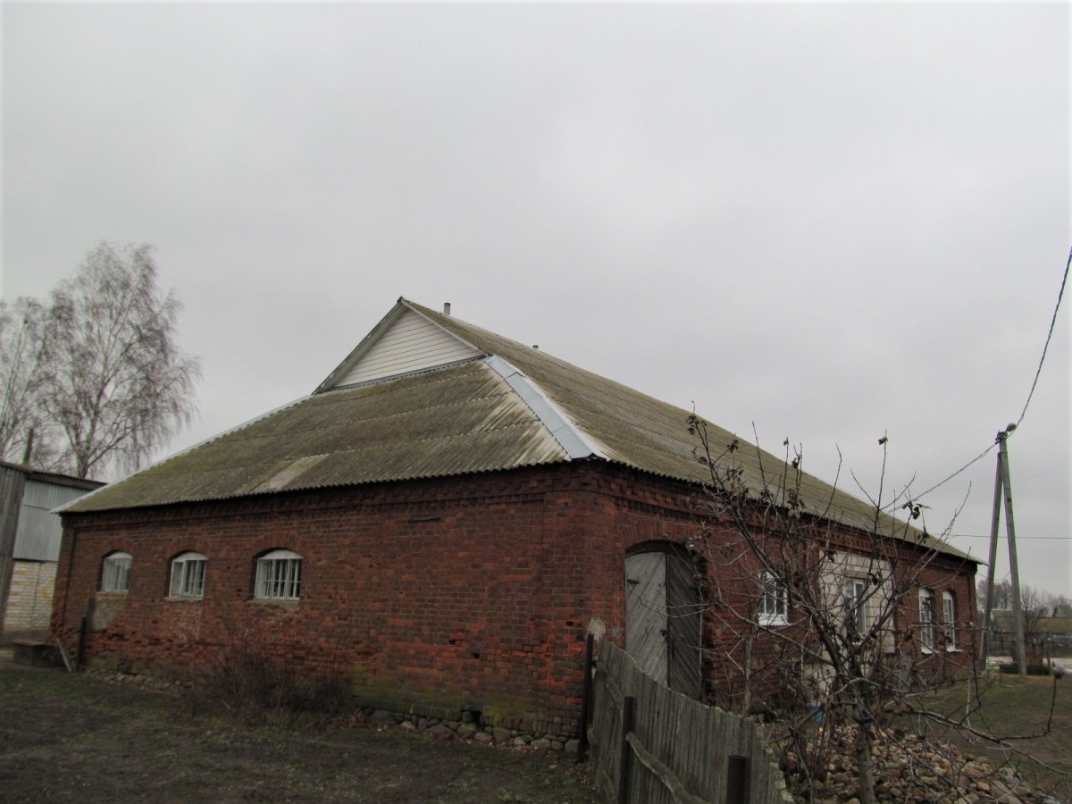 Івань. Гаспадарчыя пабудовы